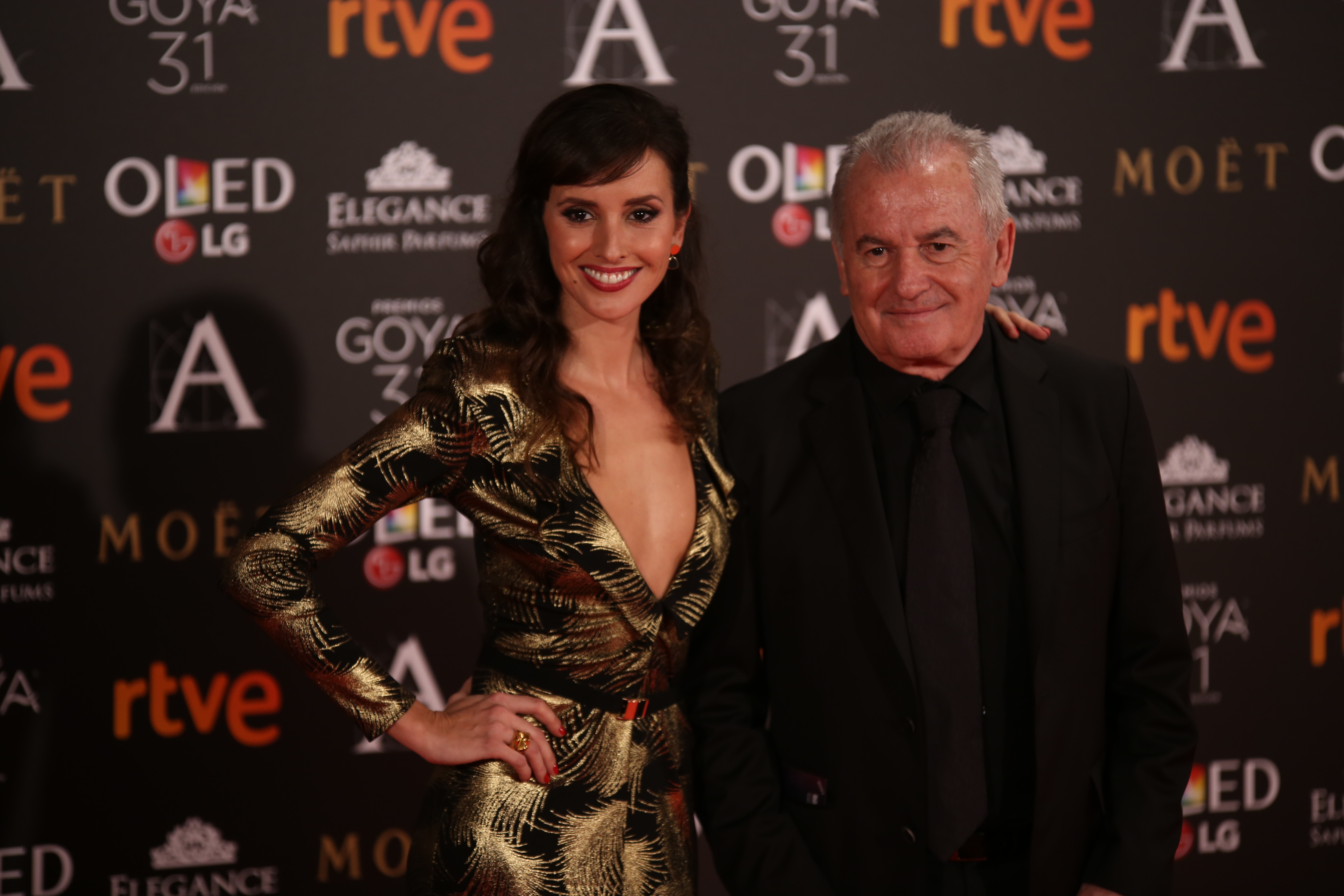 Premios Goya 2017